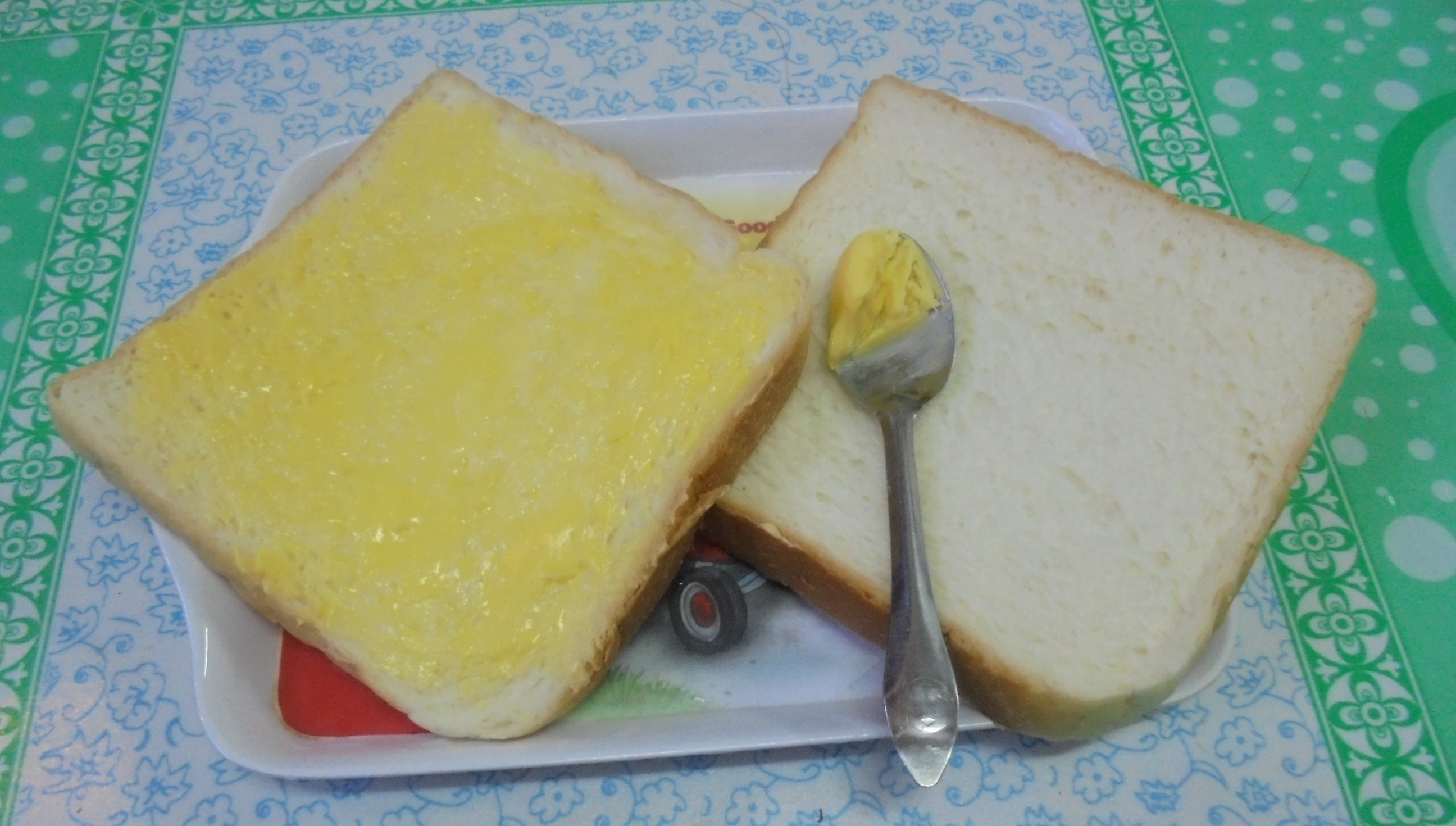 မြန်မာဘာသာ: ထောပတ်နှင့်ပေါင်မုန့်